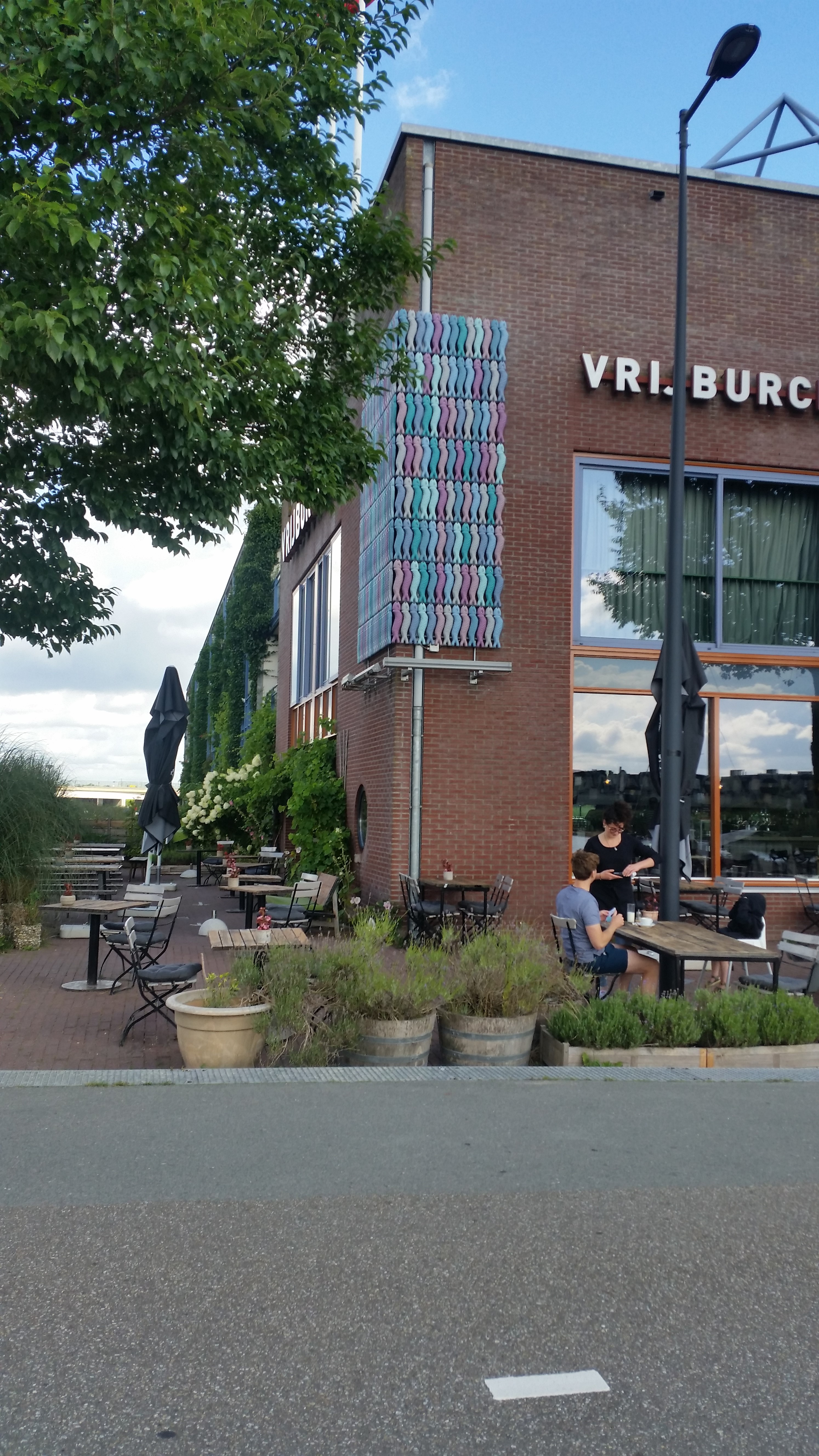 Vissen van Suzanne Willems tegenover het Gevouwen bootje op IJburg